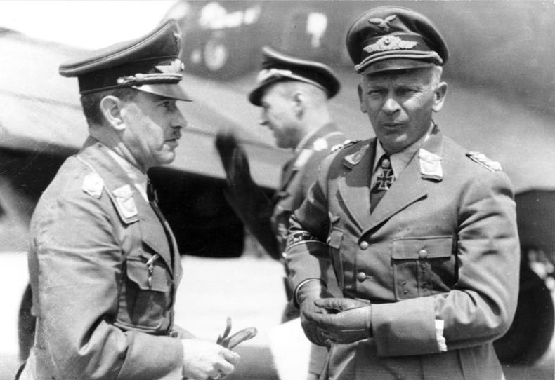 Information added by Wikimedia users.General der Flieger Alexander Löhr (left) and General der Flieger Wolfram Freiherr von Richthofen (right), Soviet Union